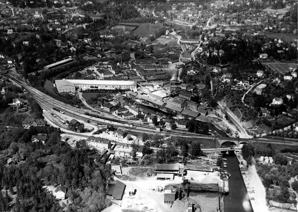 Fabrikk for produksjon av svovelsyre